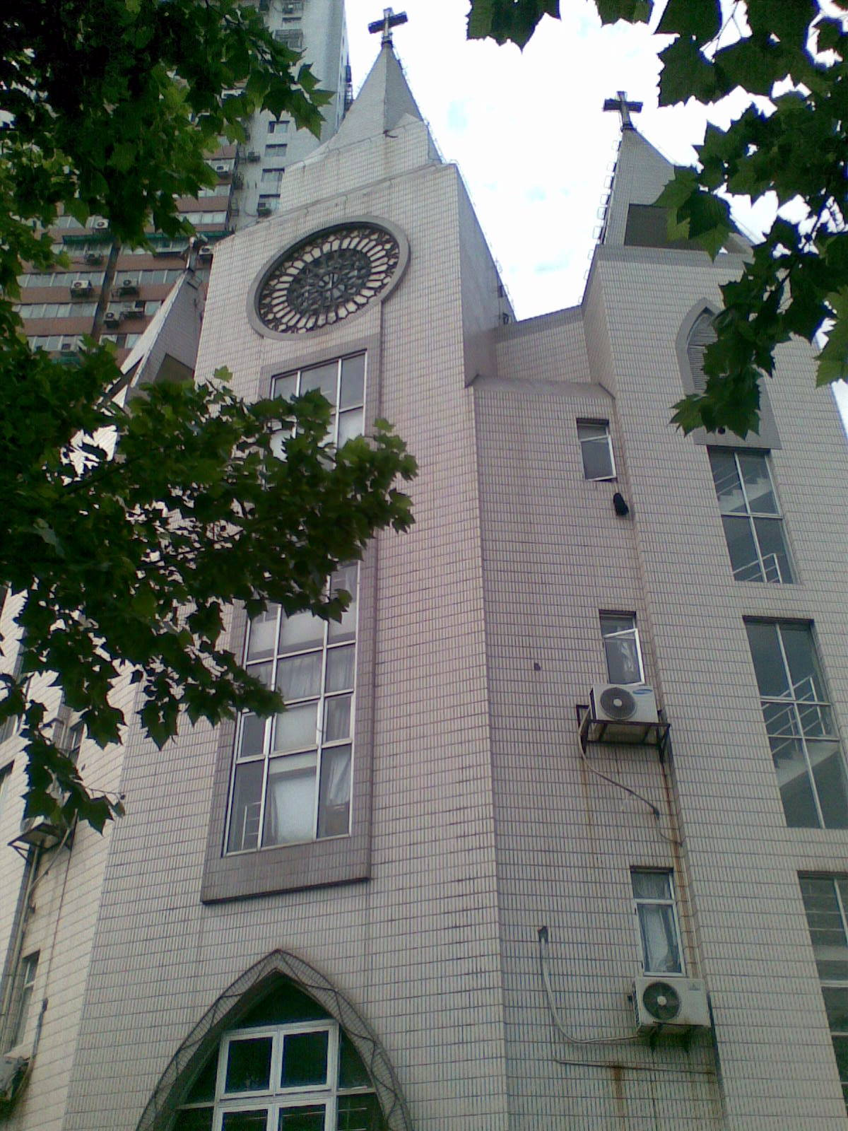 中文（中国大陆）: 南京江苏路基督教堂仰望